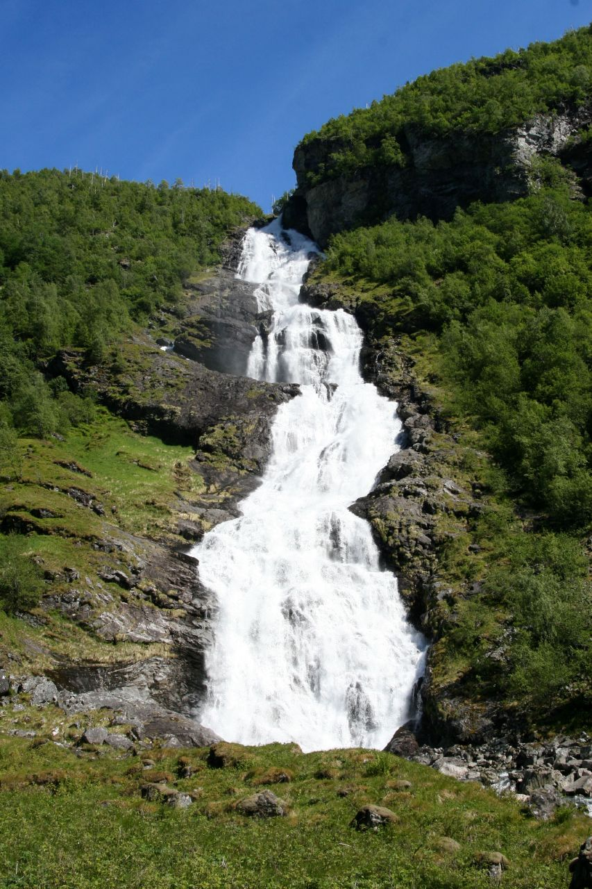 Hjellefossen